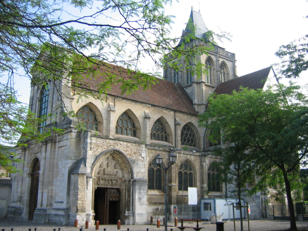 L'église Saint-Taurin, à Évreux - France - La place Saint-Taurin est un site classé en 1937, qui a survécu à la Seconde Guerre Mondiale.